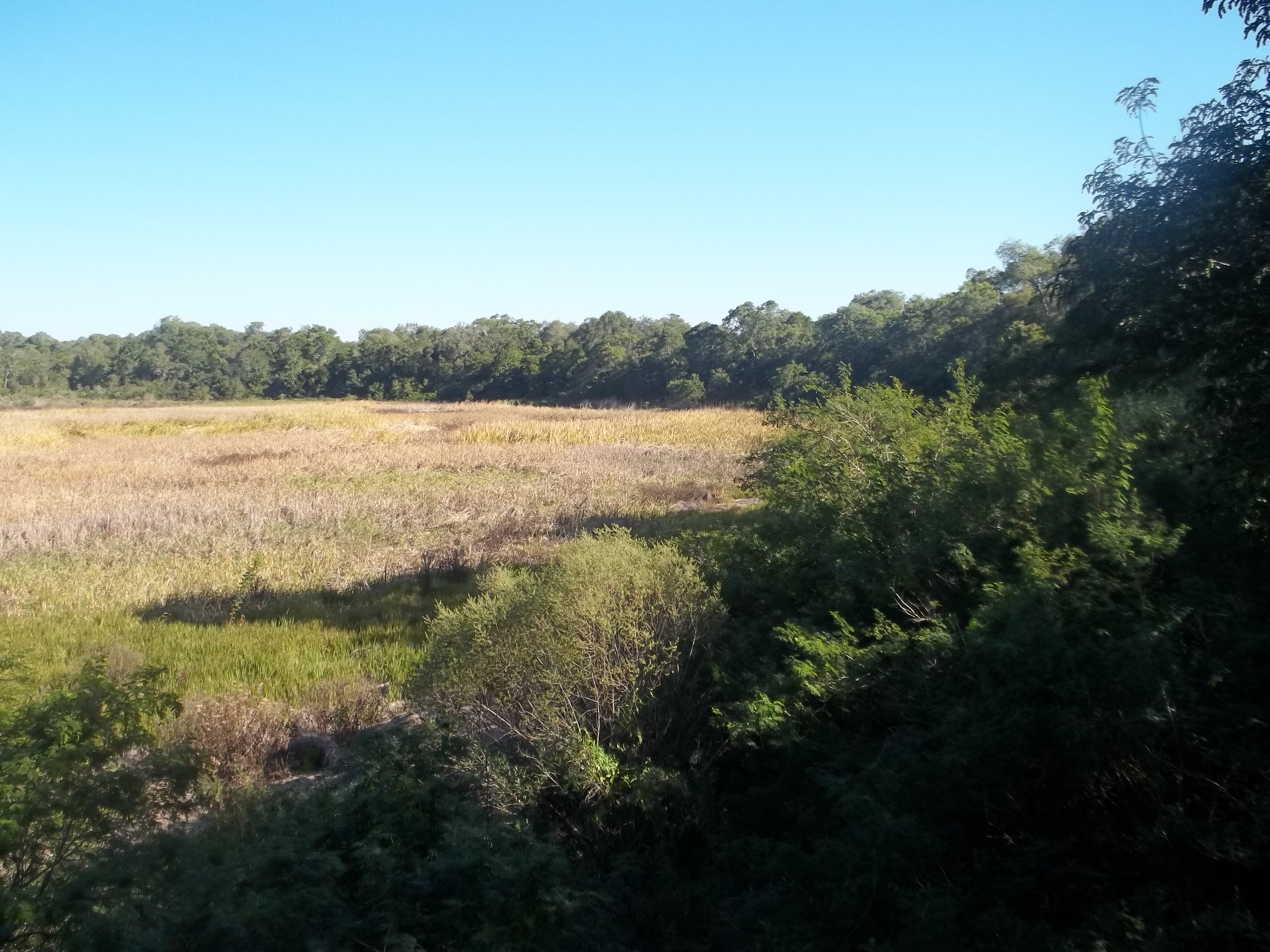 Vista de la laguna Carpincho en el Parque nacional Chaco